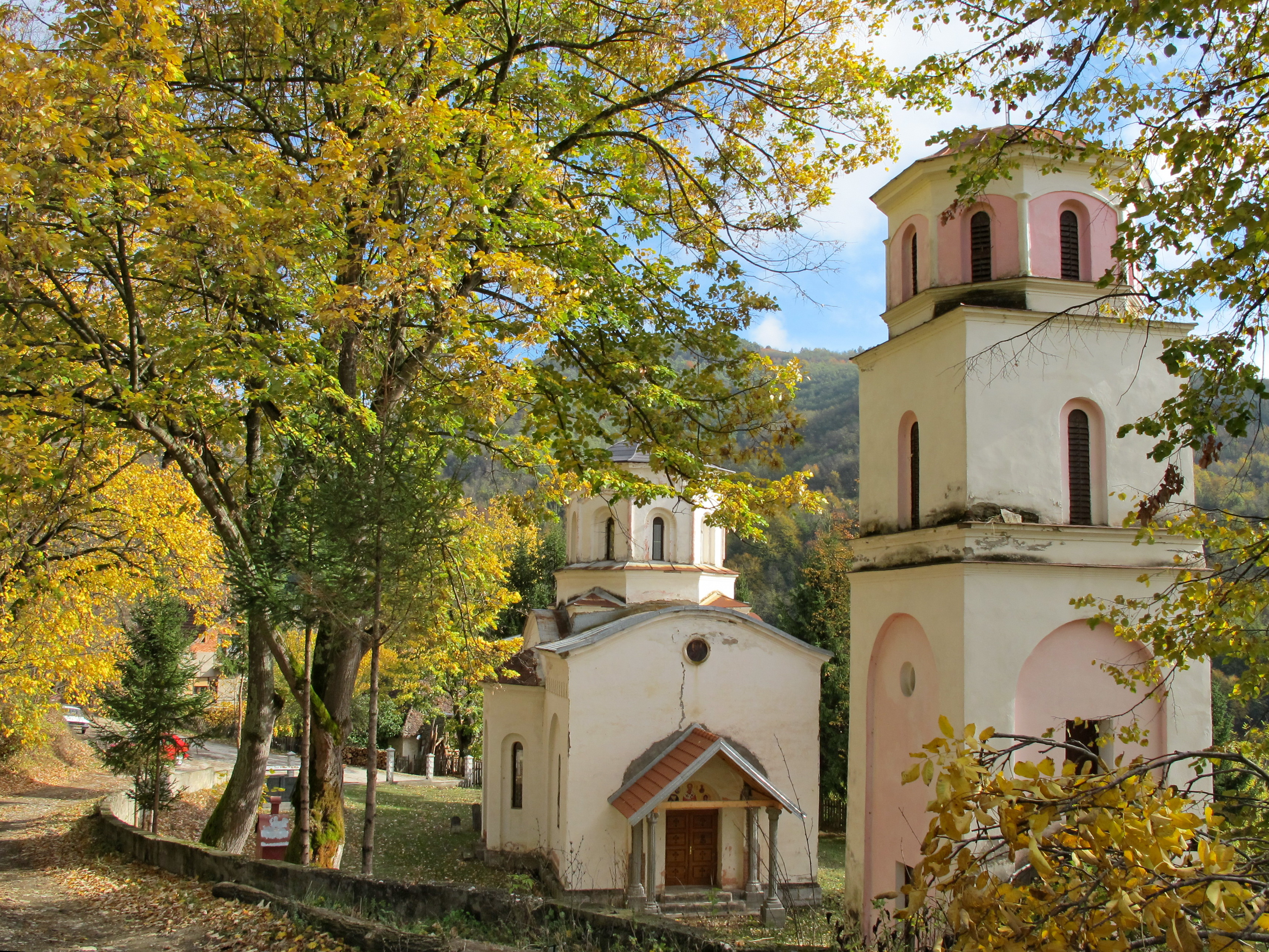 Цапарић.